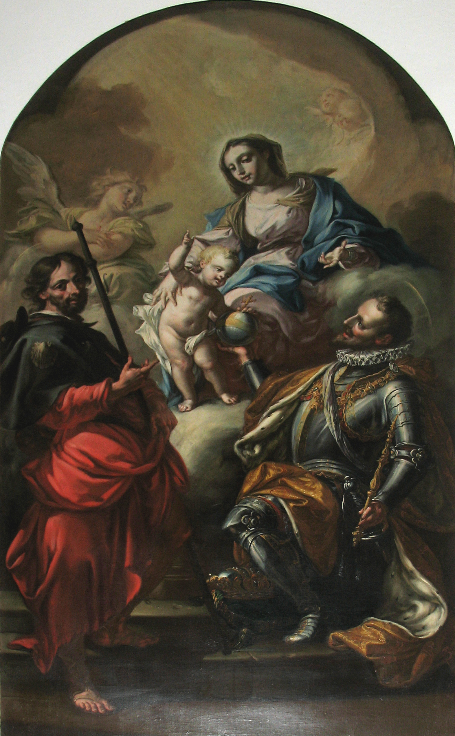 altar Lit.: Zimmeter 1902 S. 50; W. Moroder, 1907 S. 38; Weingartner, II/1923, S. 307.